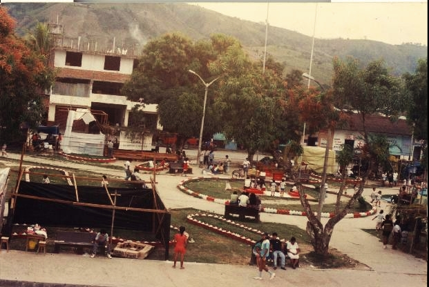 Español